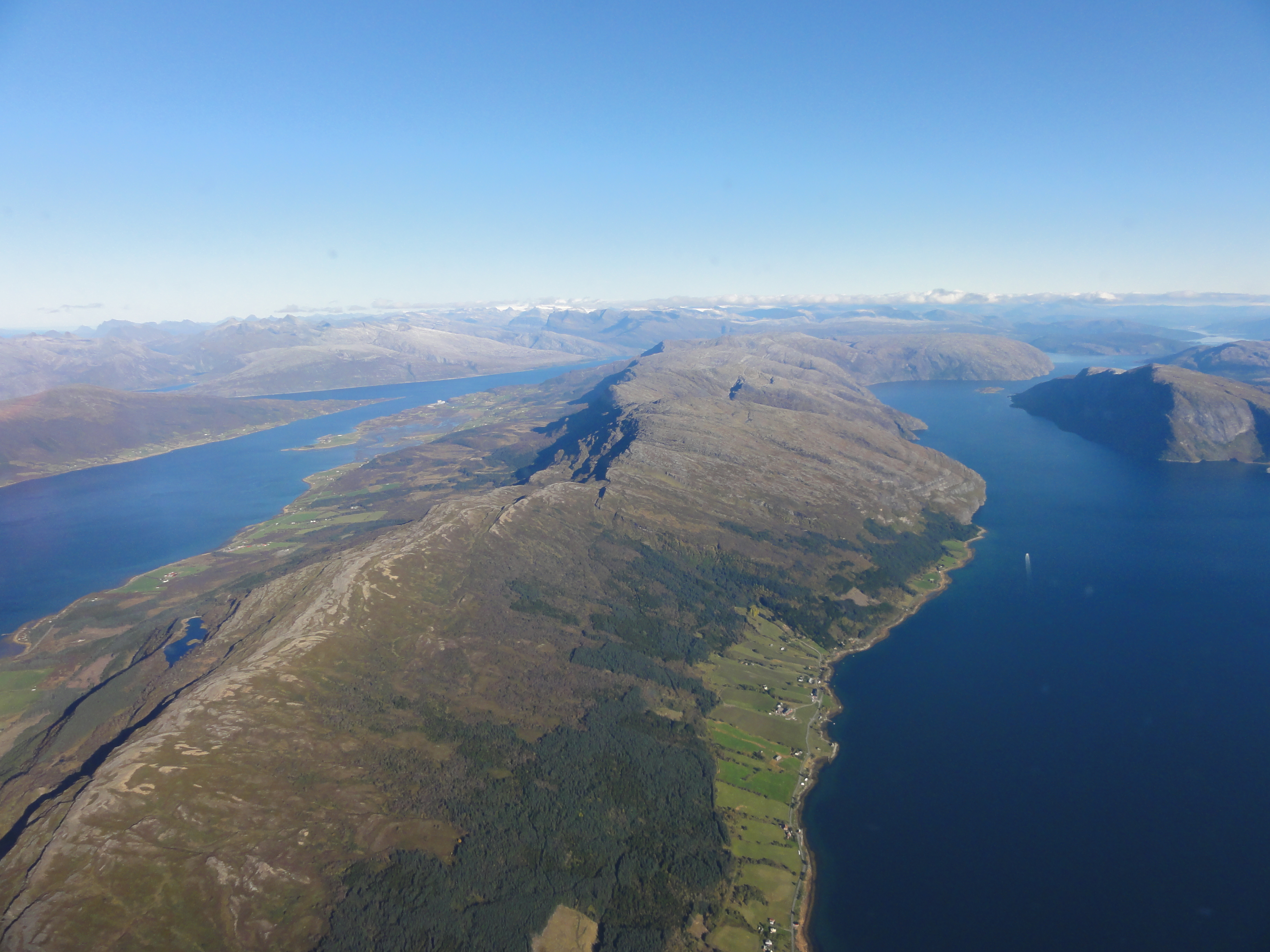 Ranfjorden i Nordland midt i bildet og Litelsjona til venstre. Fjellet mellom er Laupen.